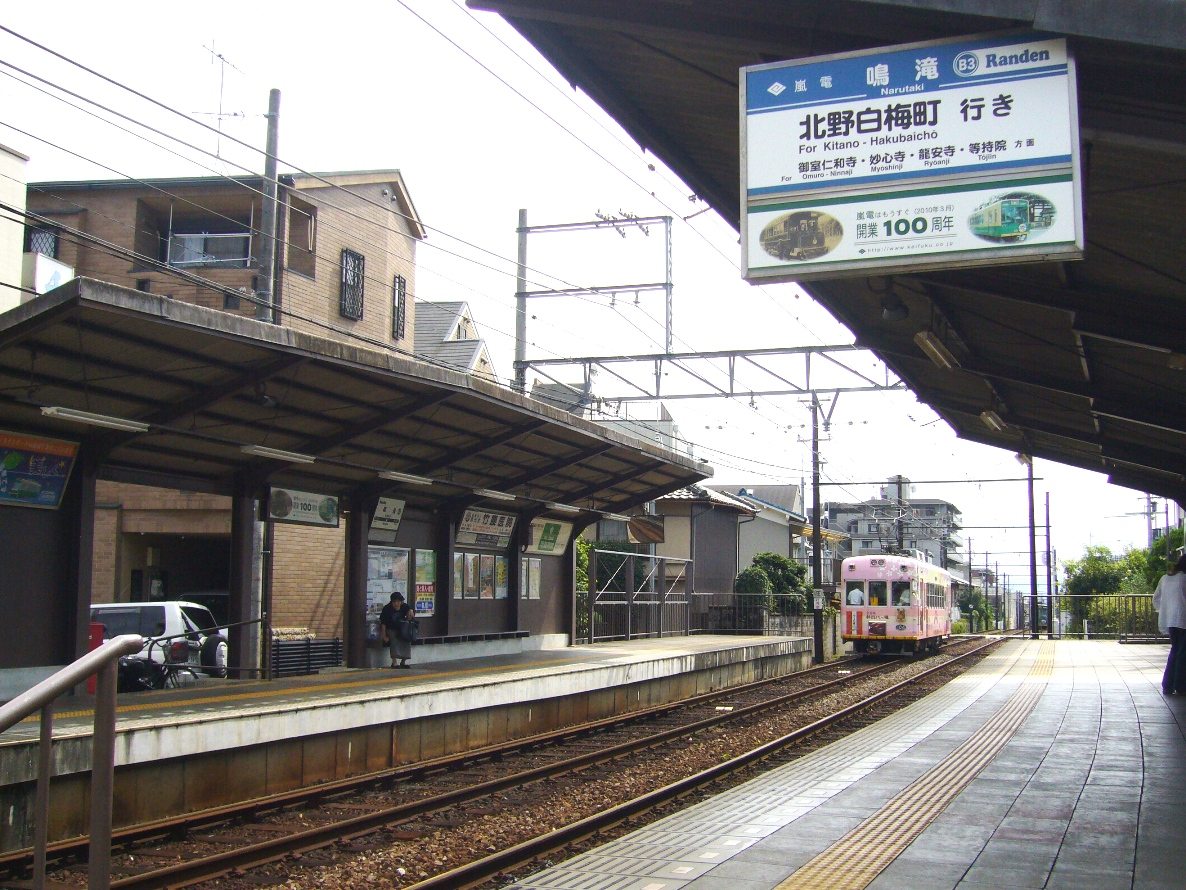 京都市右京区にある京福電気鉄道北野線鳴滝駅。発車直後の帷子ノ辻駅行きラッピング広告電車が見える。2007年9月10日に投稿者が撮影。